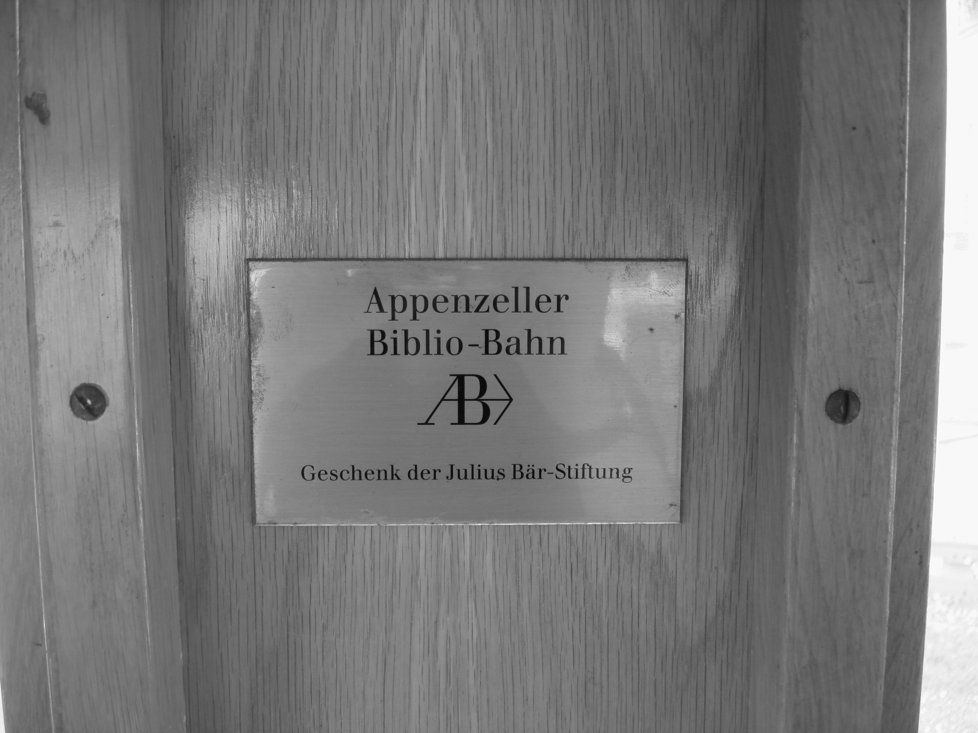 Metallgravur im Inneren der Bibliobahn